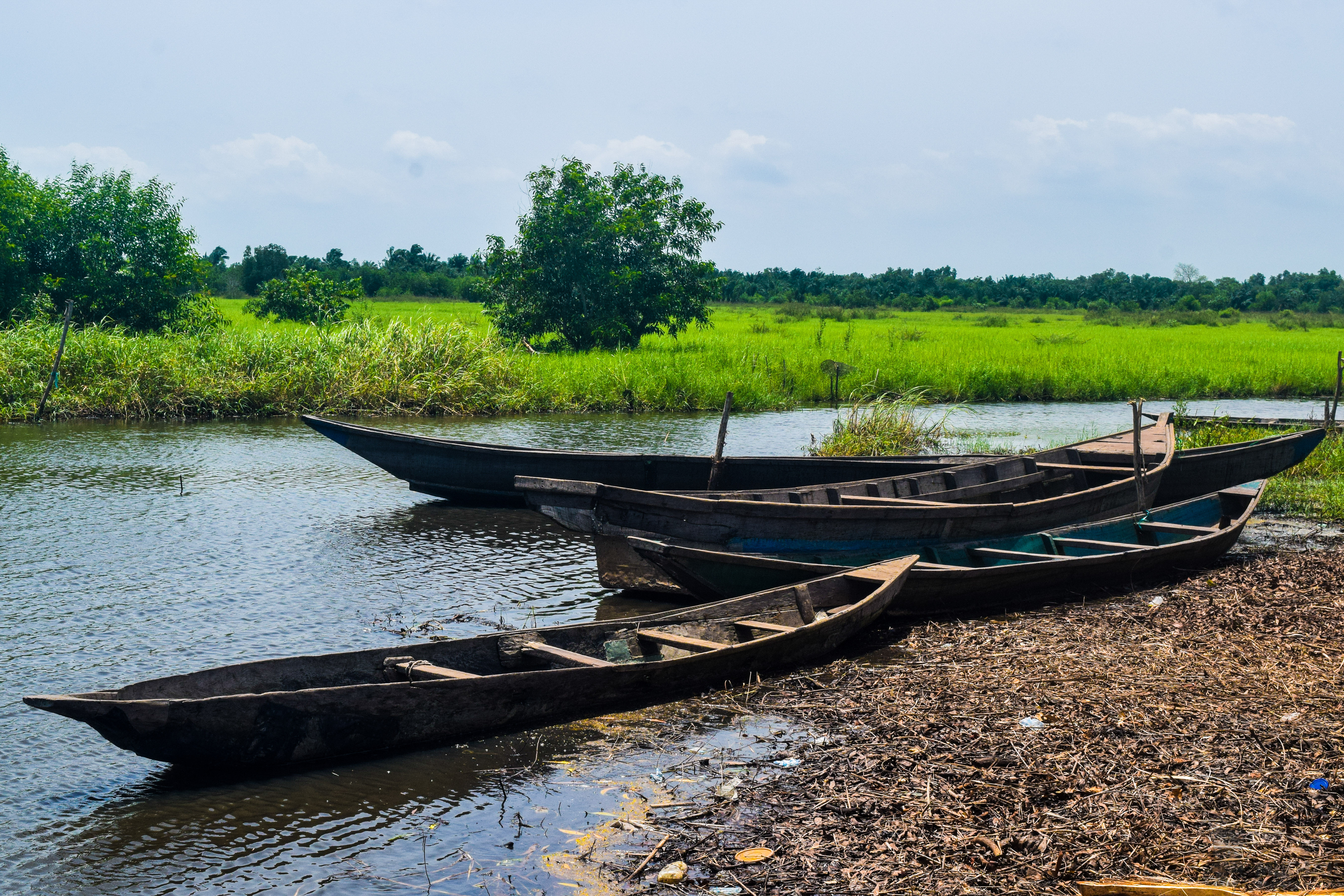 Pirogues à Gbéssou